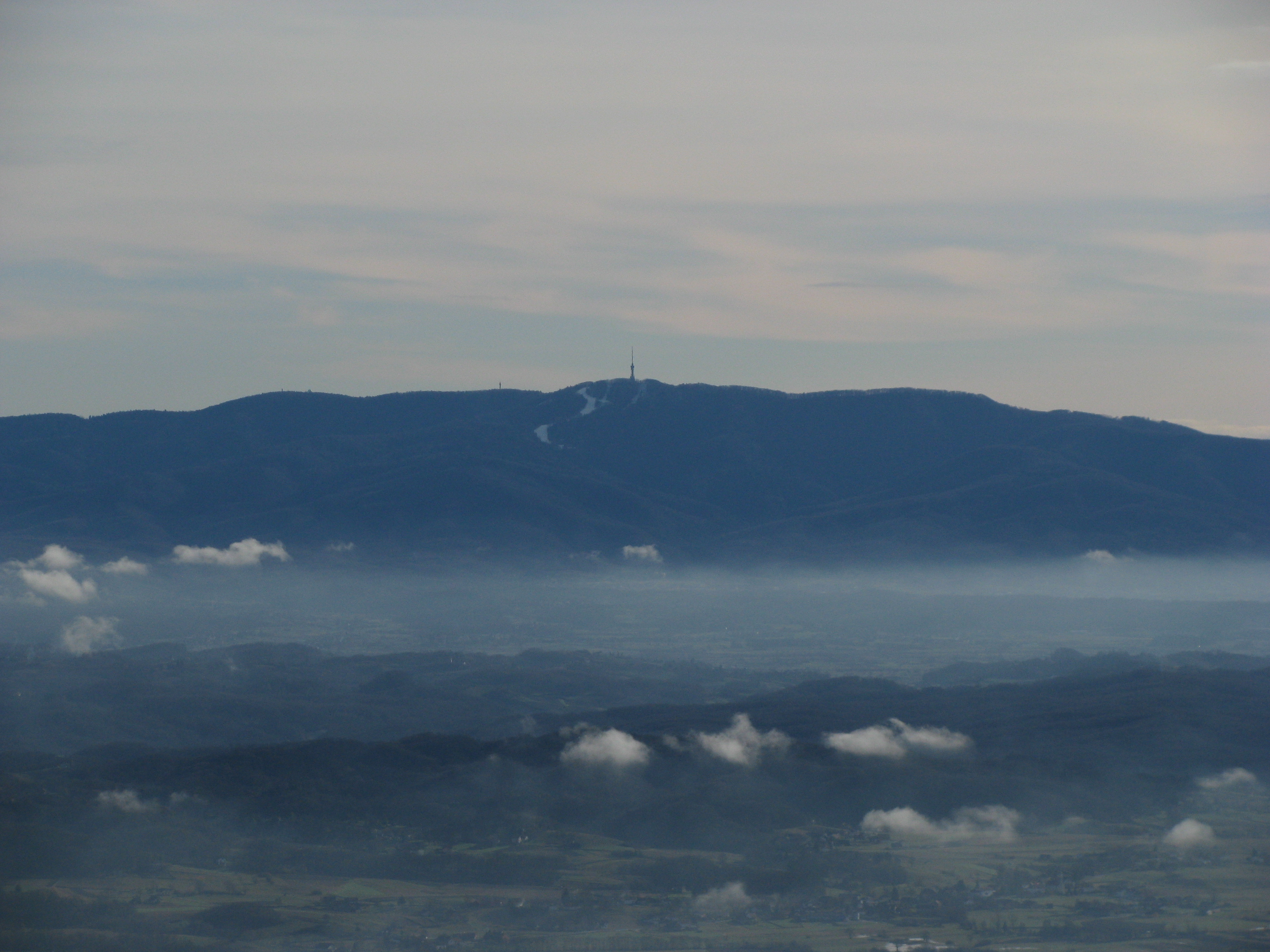 Medvednica